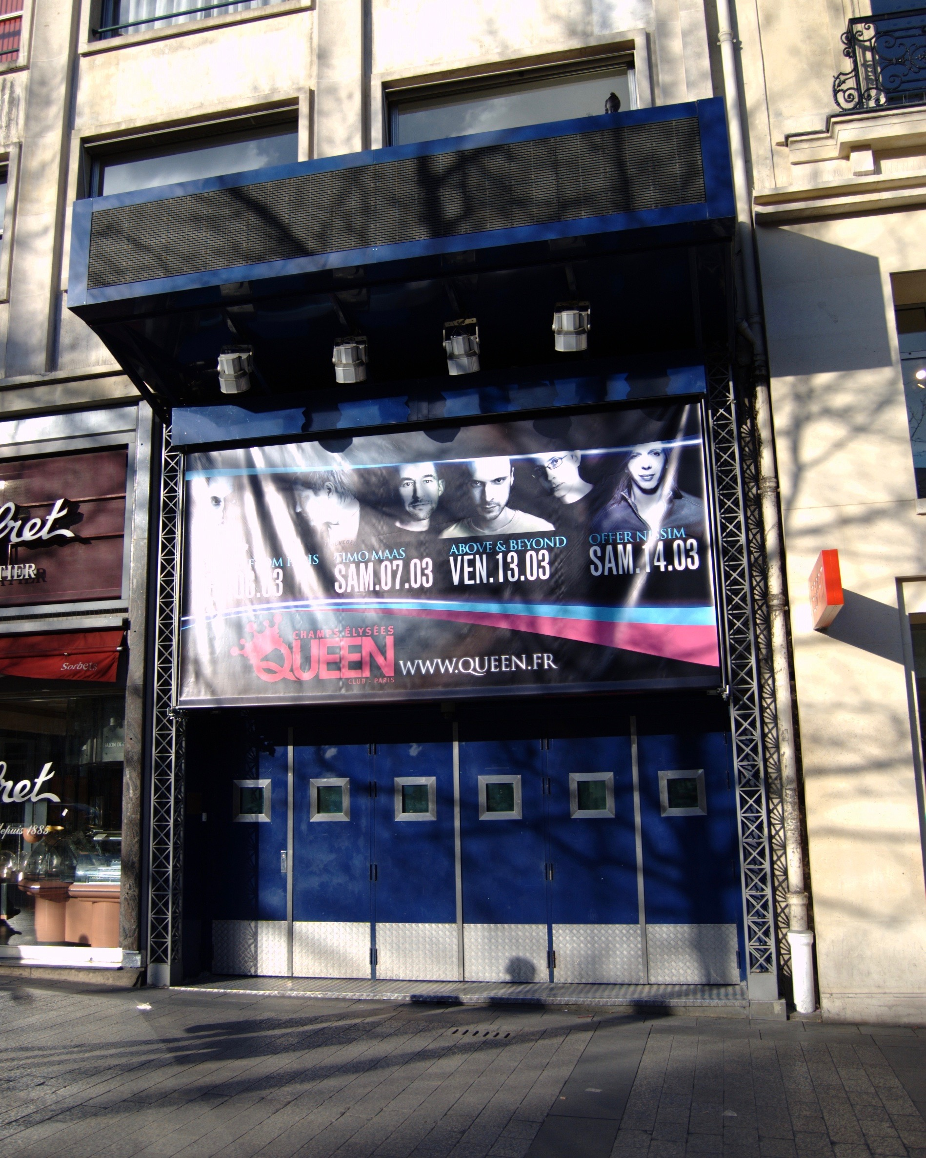 Le Queen - Paris. 06 mars 2009